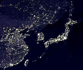 で表示される画像をトリミングしたもの